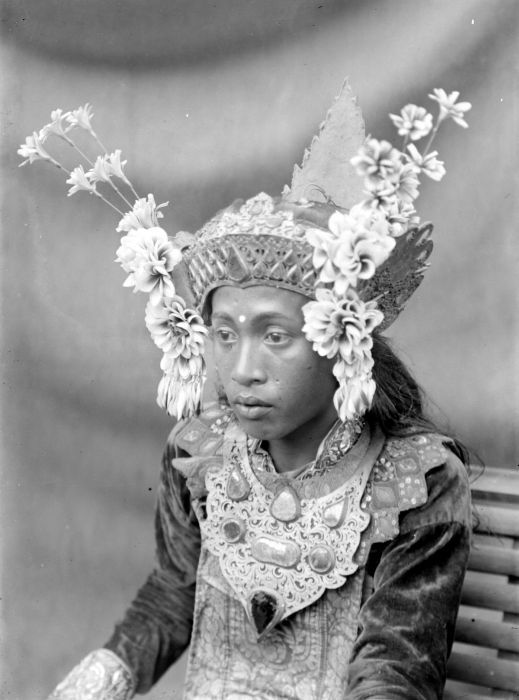 Negatief. Portret van een legong danser op Bali